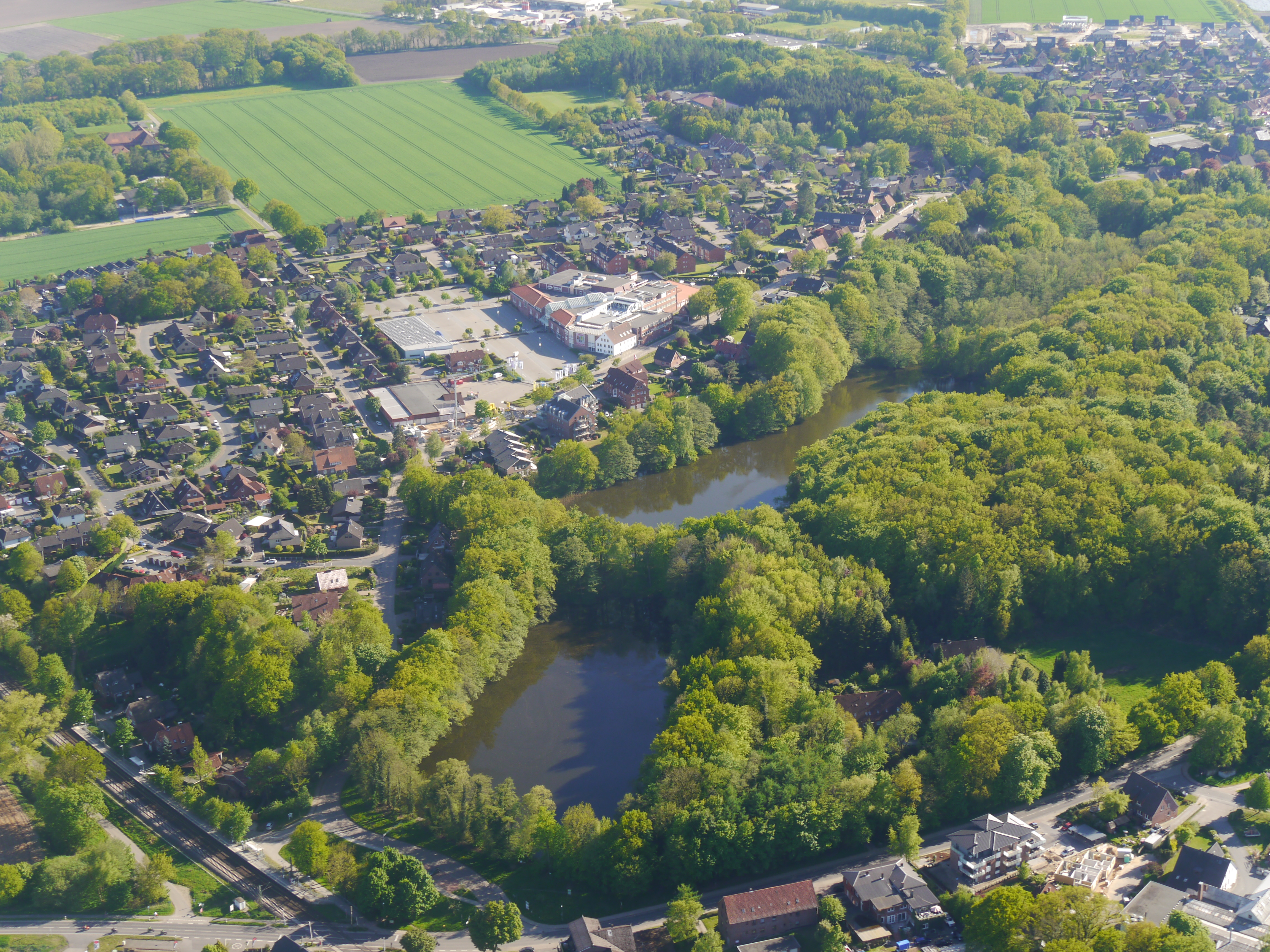 Dollern aus der Luft